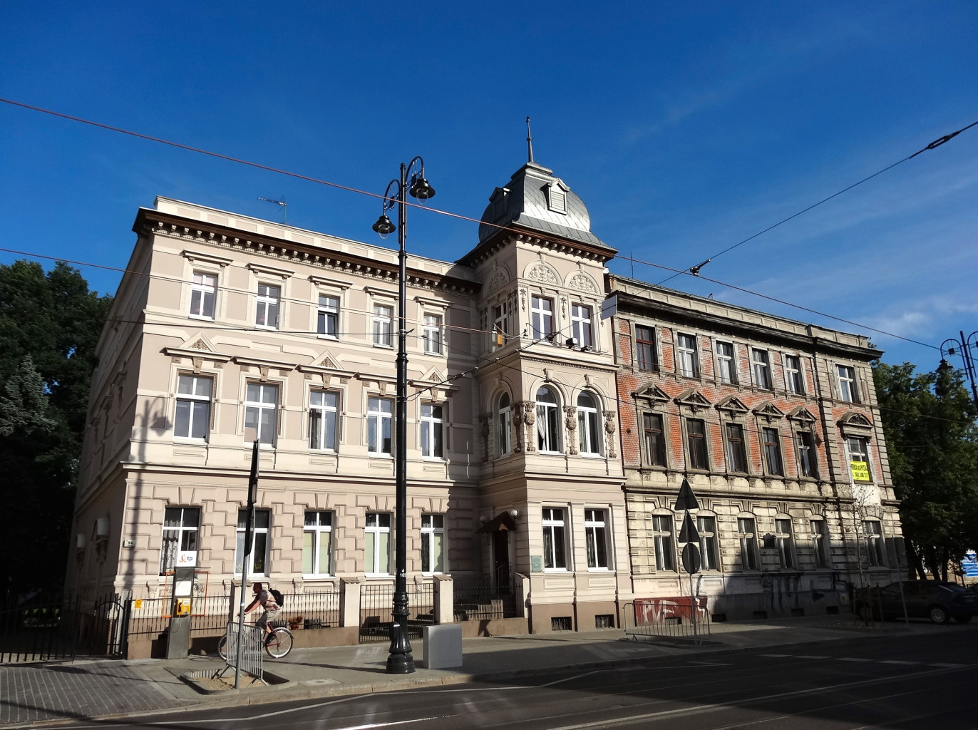 Kamienica przy ul. Gdańskiej 92-94 w Bydgoszczy (1889-1892, aut. Józef Święcicki)